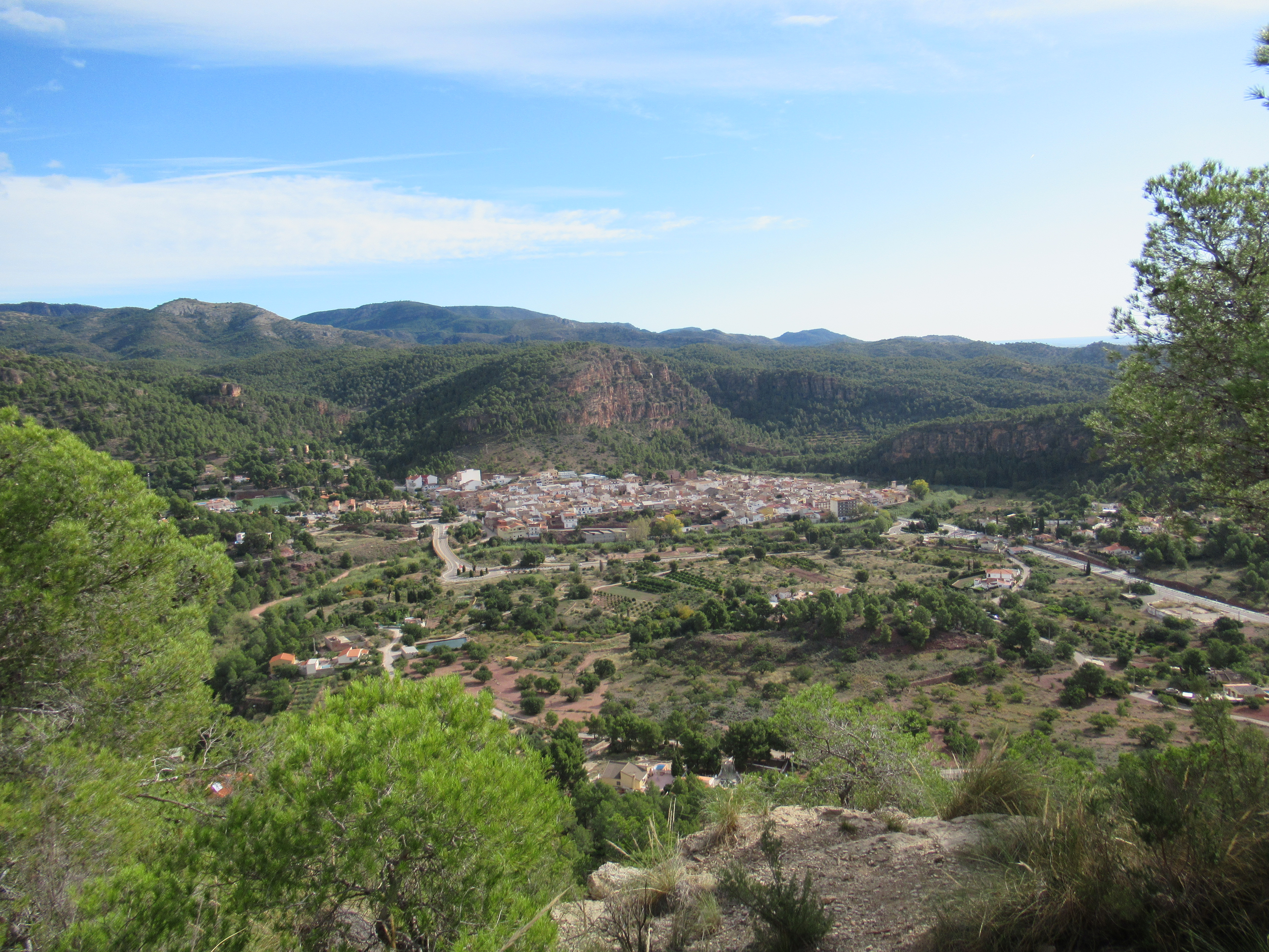 Imagen tomada desde el Poblado ibérico del Puntal dels Llops, antiguo asentamiento en el termino municipal de Olocau. La fotografía ofrece una visión completa del pueblo de Olocau y muestra parte de la Sierra Calderona. This is a photography of a Special Area of Conservation in Spain with the ID: Parque natural de la Sierra Calderona. natural de la Sierra Calderona Natura2000 entry, natural de la Sierra Calderona EEA entry